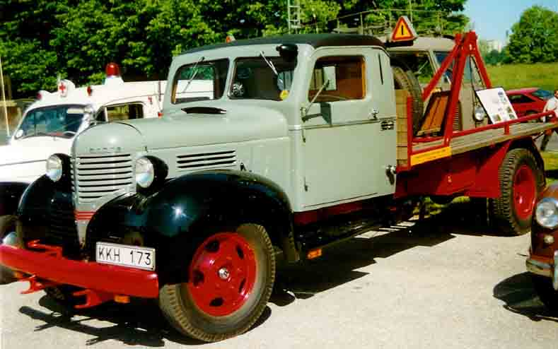 Dodge TXE32 Wrecker 1939